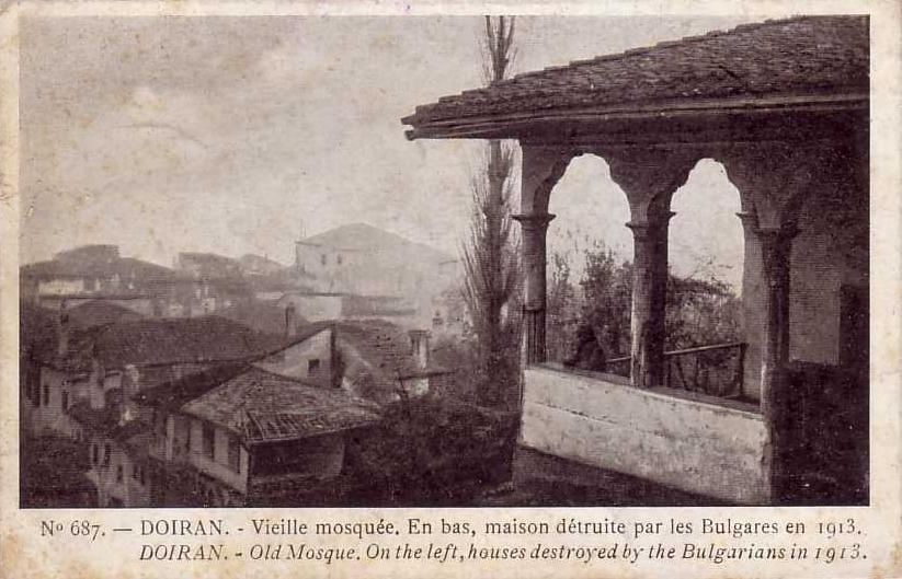 Разрушениот Дојран во 1913 од страна на бугарите